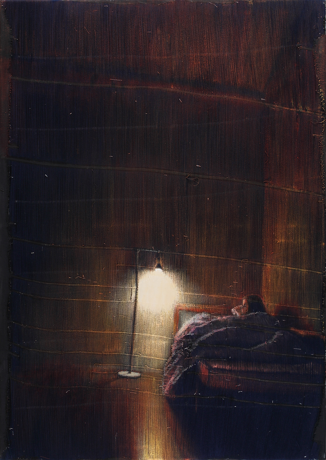 František Matoušek, V noci, akryl na párané riflovině, 130 X 90 cm (2009)